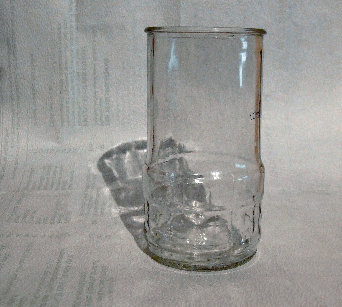 Współczesna musztardówka Autor:Mohylek 01:44, 20 lip 2006 (CEST)